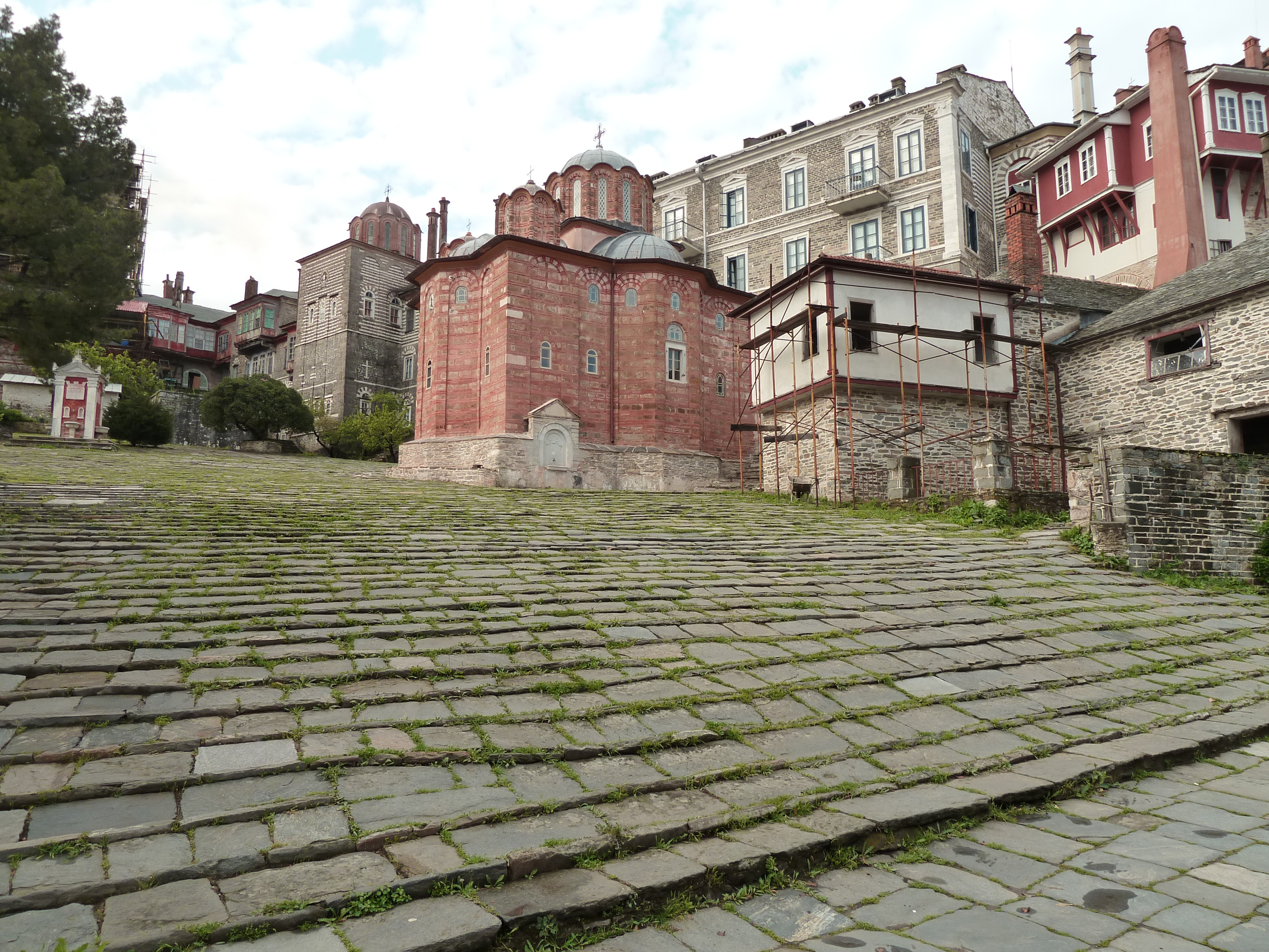 Cour intérieure du monastère de Vatopedi (Mont Athos)